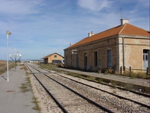 Antigua estación de Monteal del Campo (Teruel). 2002.